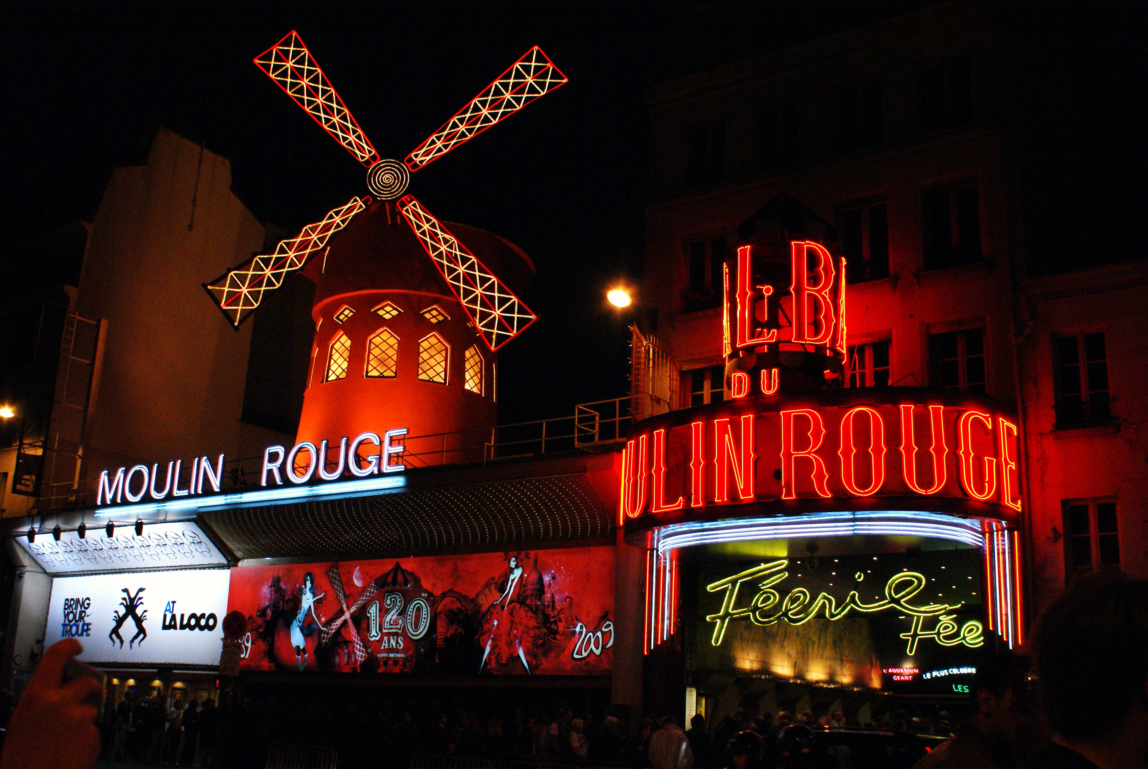 Moulin Rouge in Paris